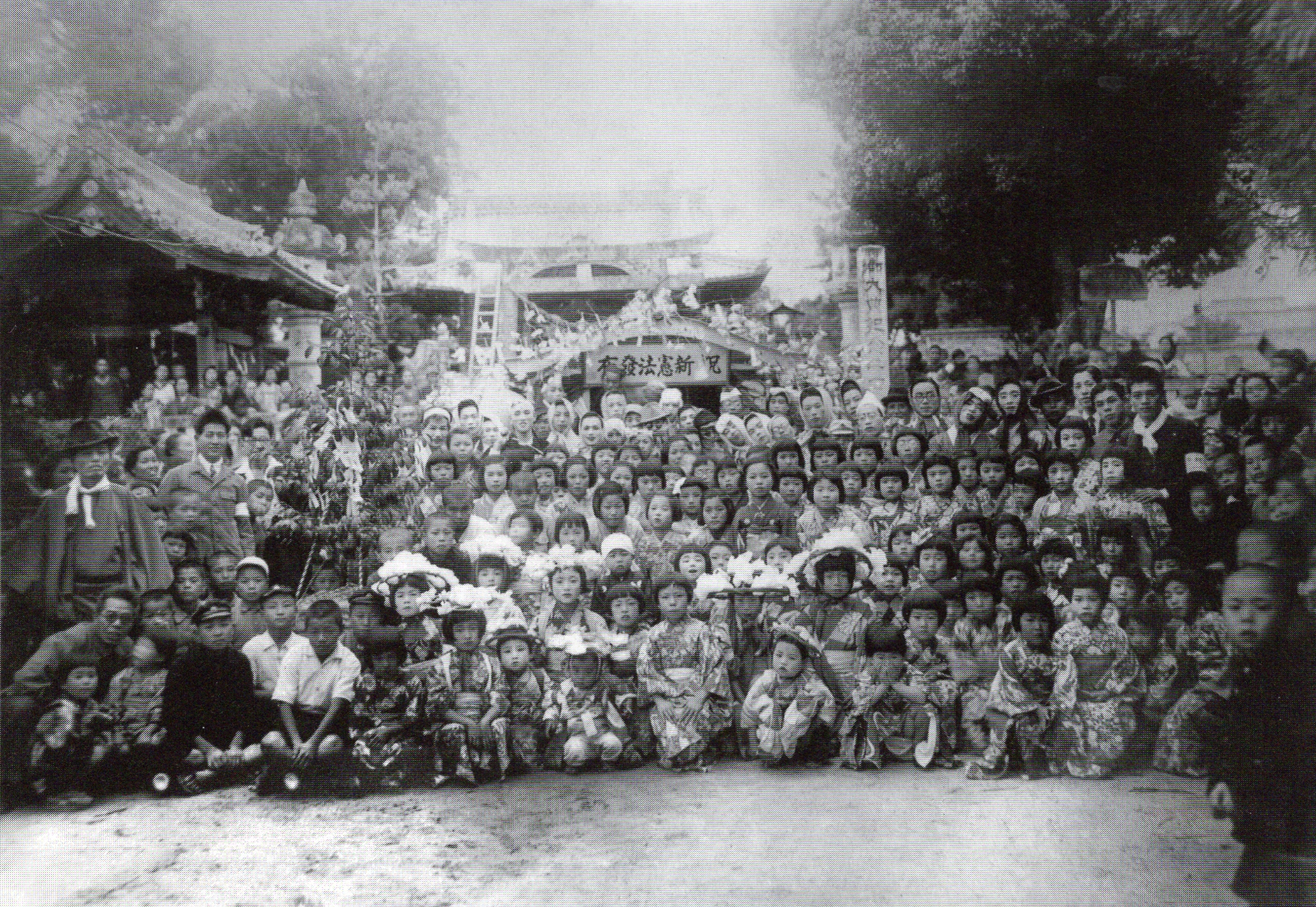 井田八幡宮（岡崎市井田町）。日本国憲法公布を祝う記念写真。1946年11月3日撮影。